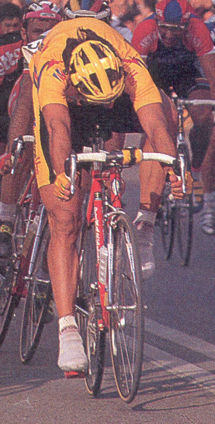 Gian Matteo Fagnini (2e in de 1e etappe van de Ruta del Sol 1995)